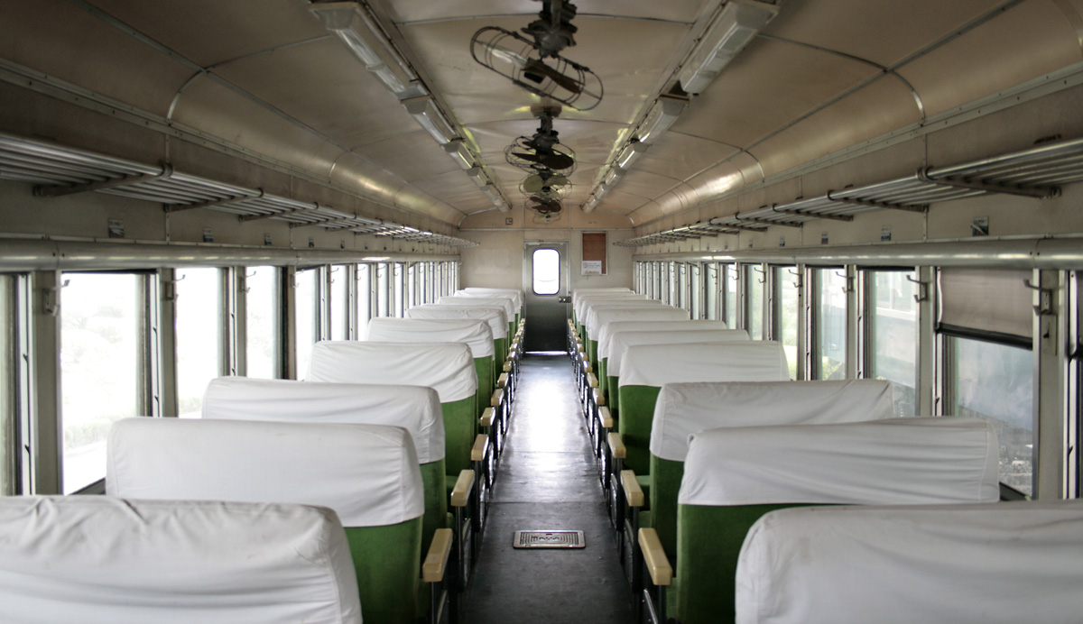 철도박물관에 전시중인 통일호 객차 내부